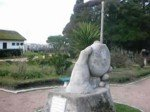 Monumento al Mate en Sarandí del Yí Uruguay